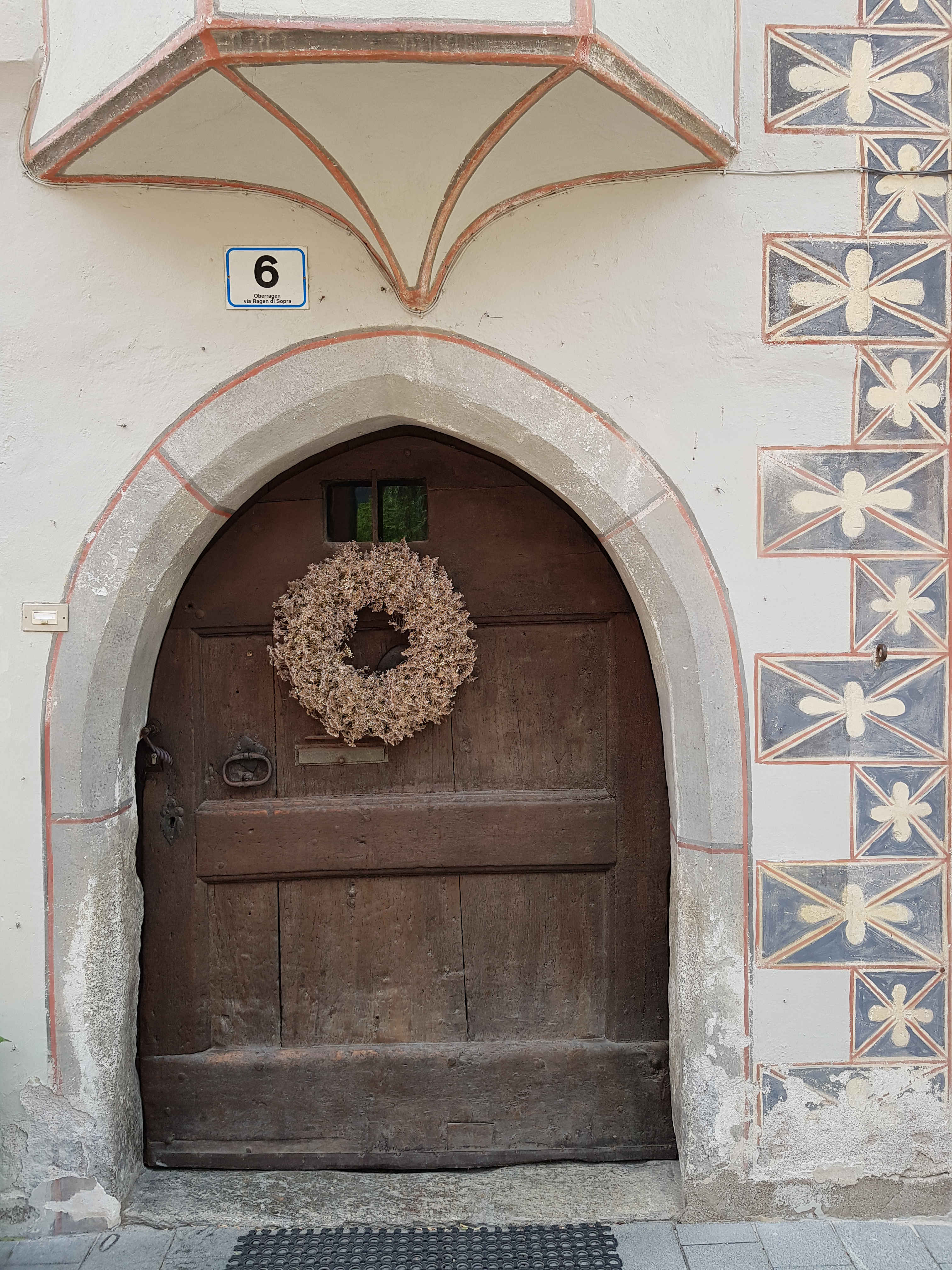 Haustor, Oberragen 6, Bruneck, Südtirol